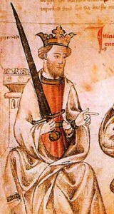 El rey Sancho IV de Castilla (1258-1295).